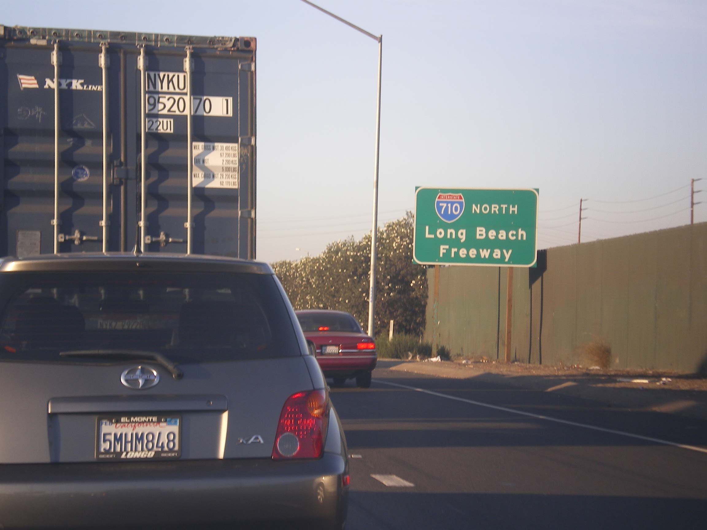 Beginn des Long Beach Freeway (I 710) in Long Beach.